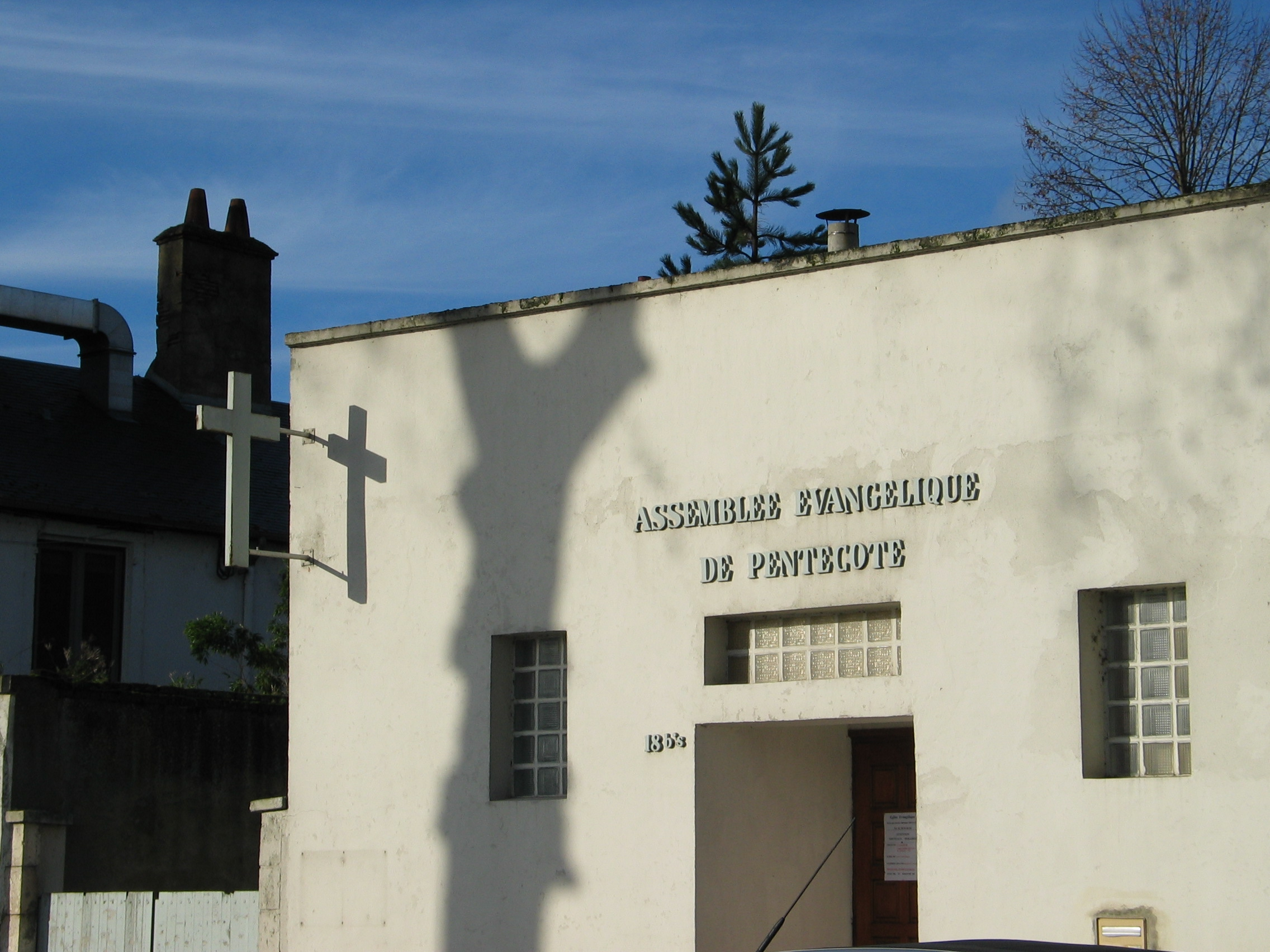 Lieu de culte de l'assemblée évangélique de Pentecôte d'Orléans.